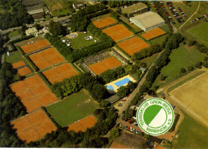 Die Anlage von Grün-Weiss Mannheim aus der Vogelüerspektive